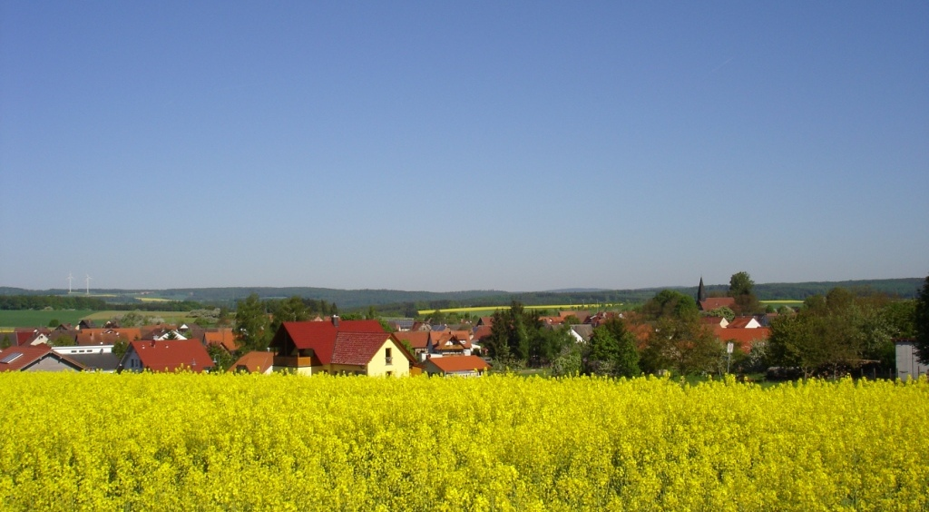 Südansicht von Sonderriet